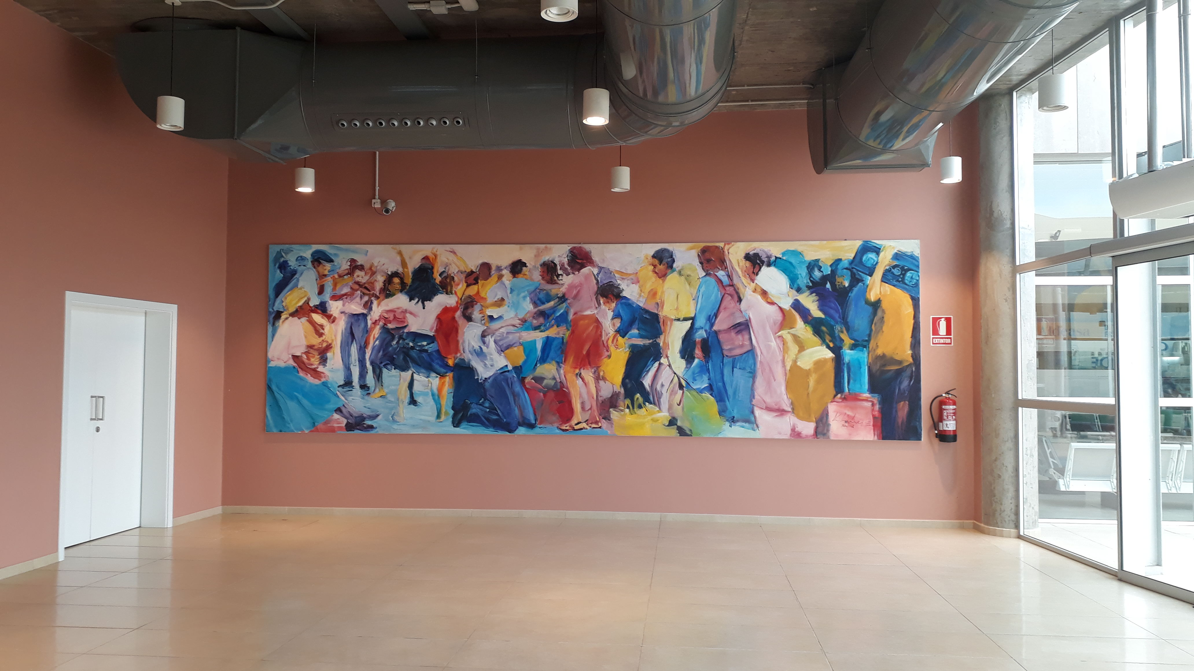 Mural da sala de embarque do Aeroporto Amilcar Cabral, na Ilha do Sal, vila de Espargos, Cabo Verde, em 23 de setembro de 2018.